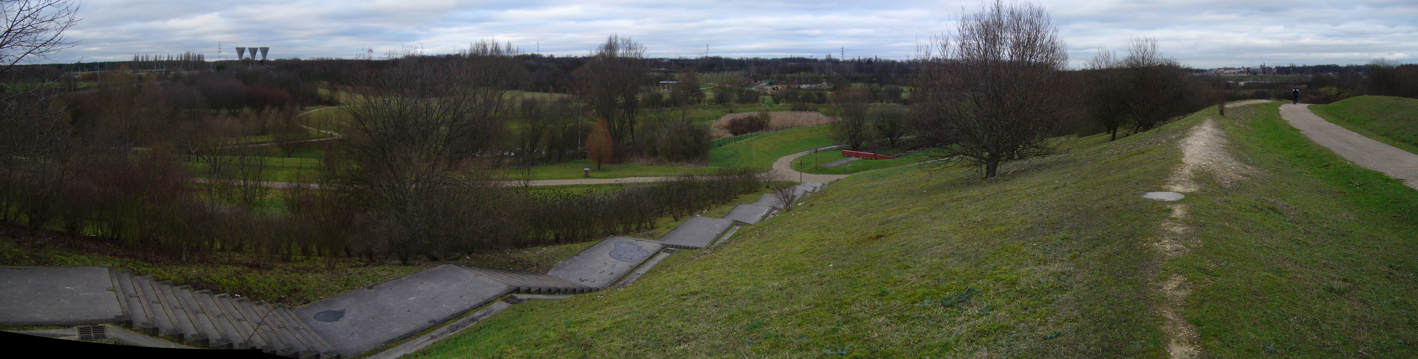 Vue du parc départemental du Sausset à Villepinte (France)/ view of Villepinte's part of the parc départemental du Sausset.